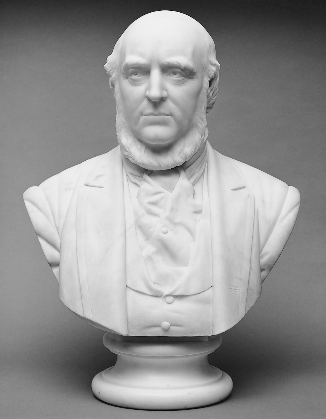 Bust; Sculpture